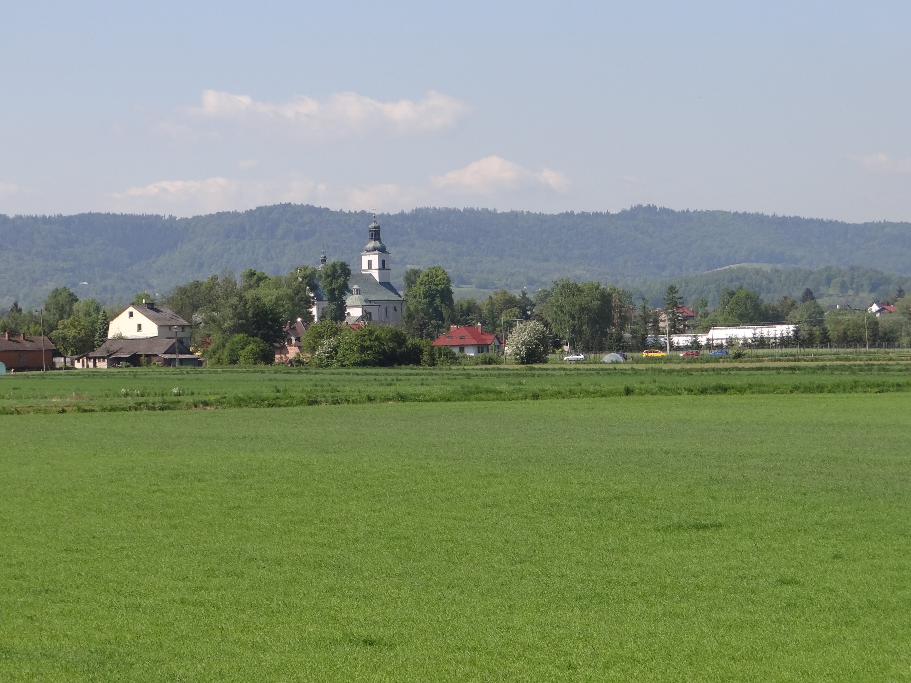 Zakliczyn oraz pasmo Mogiły